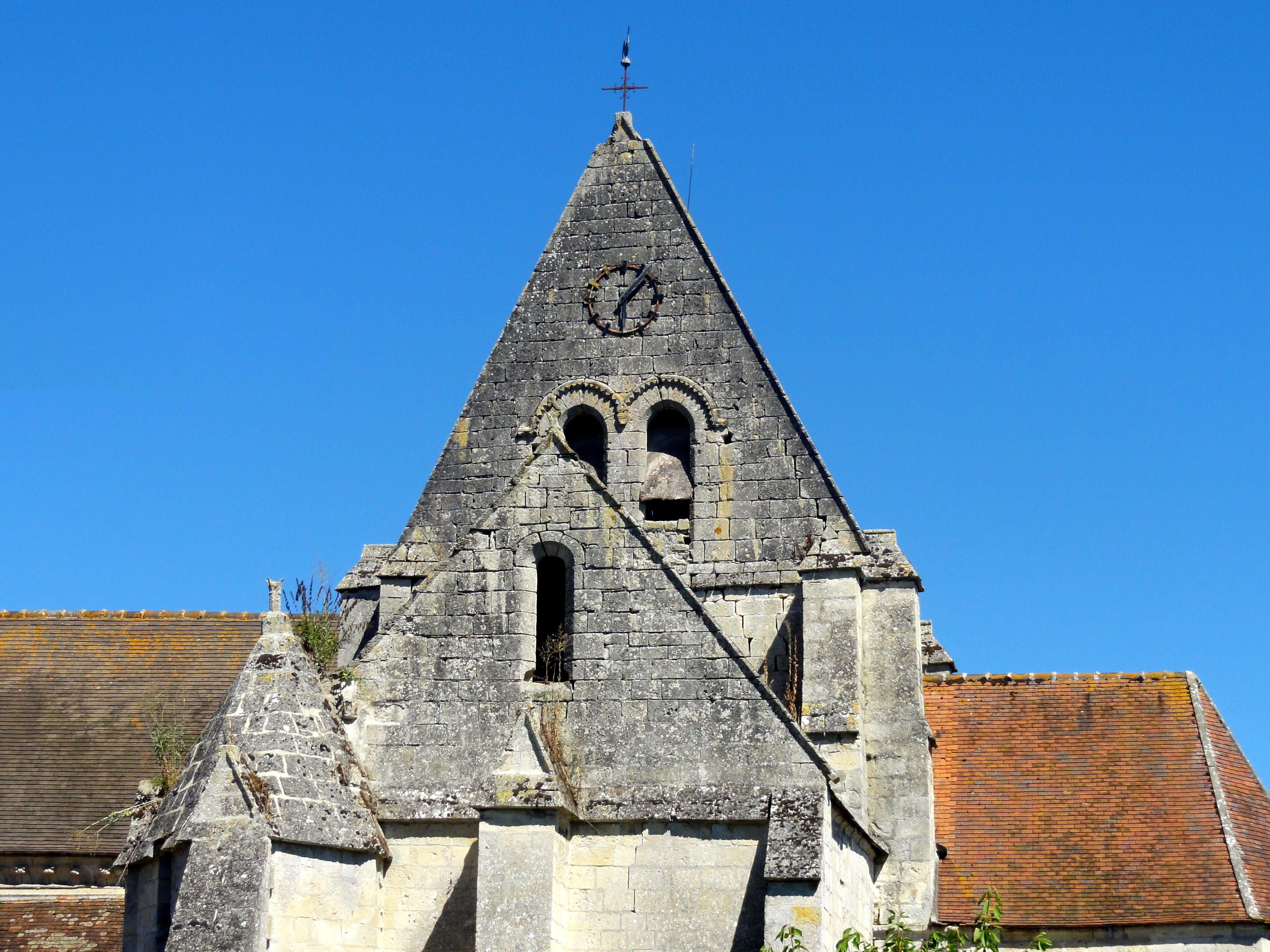 Pignon du croisillon sud et clocher.